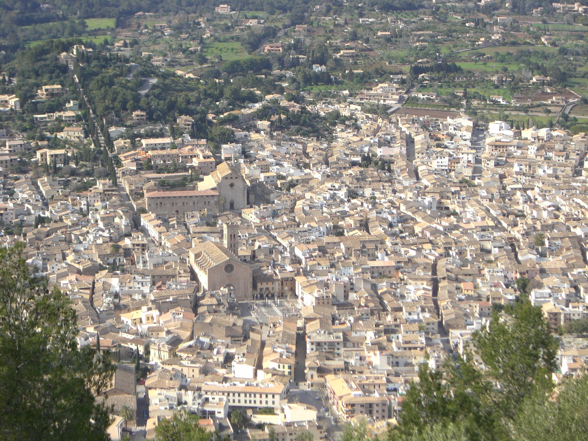 Pollença des del Puig de Maria.